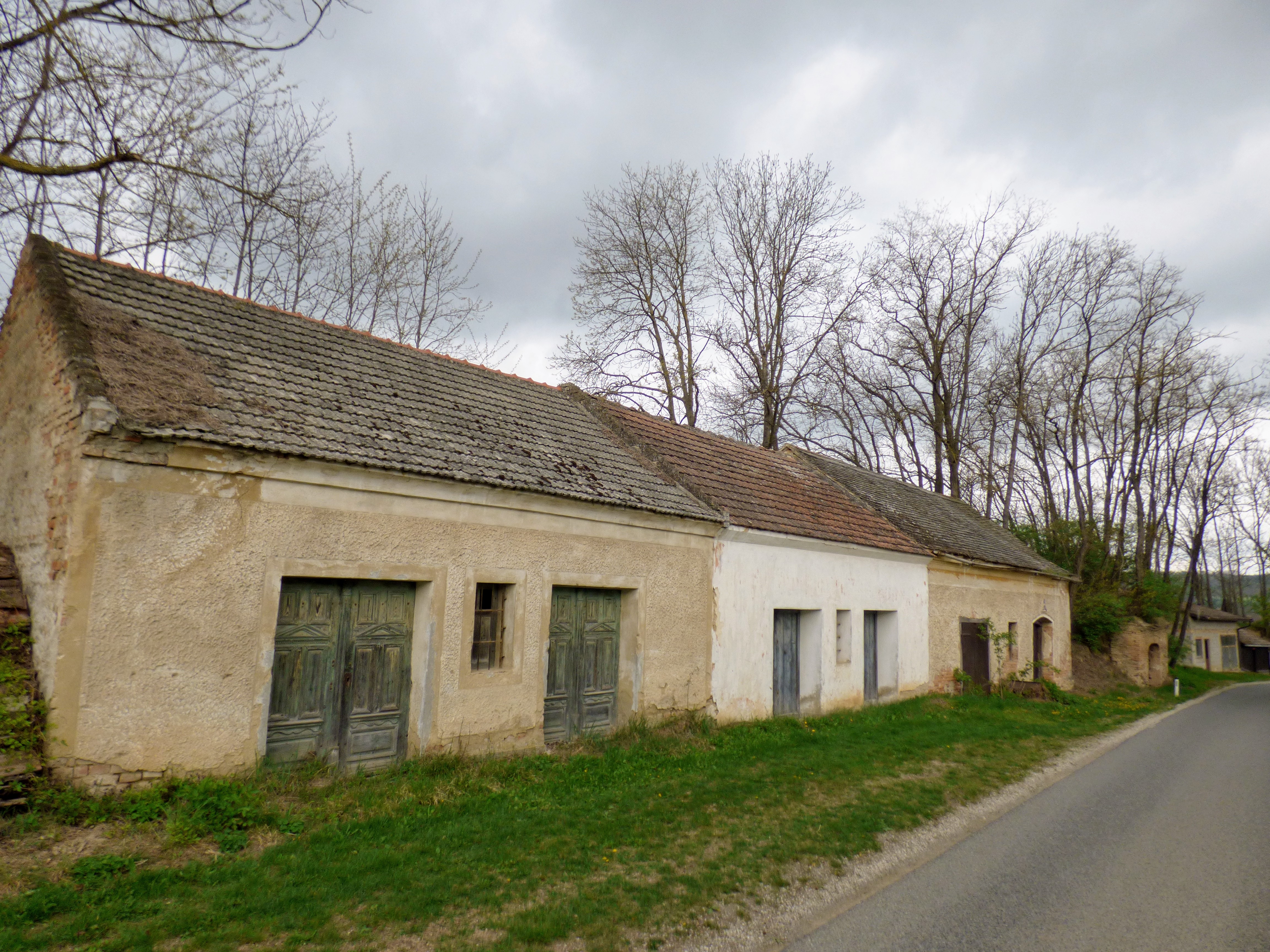 Mühlgraben-Kellergasse bei Großriedenthal (Niederösterreich)